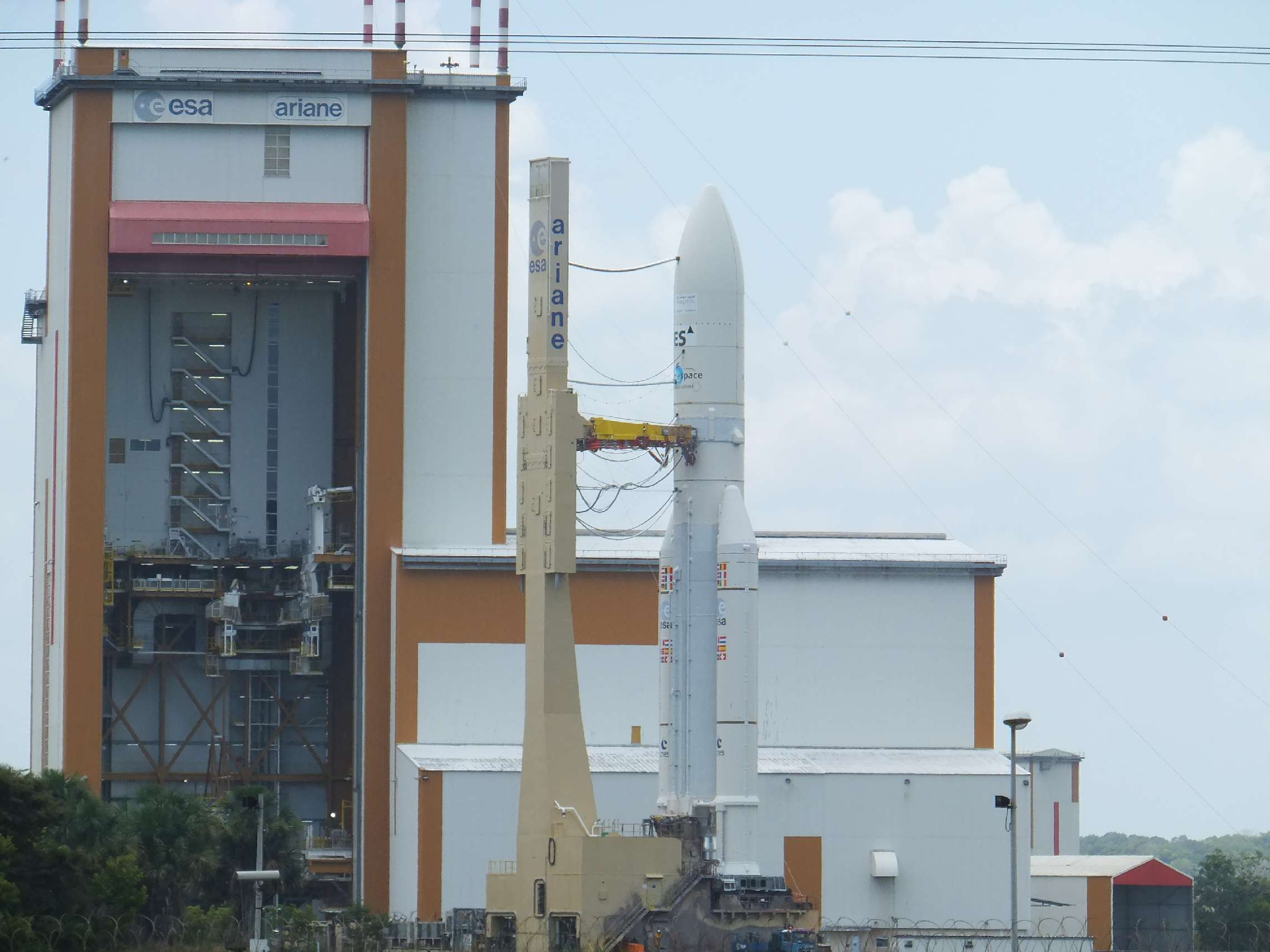 Ariane9